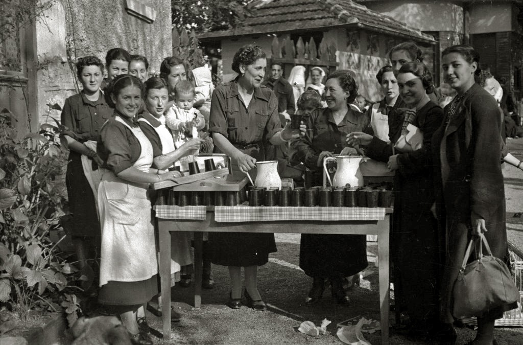 Título original: Reparto de comida por mujeres de la Sección Femenina (9/14) Localización: Guipúzcoa